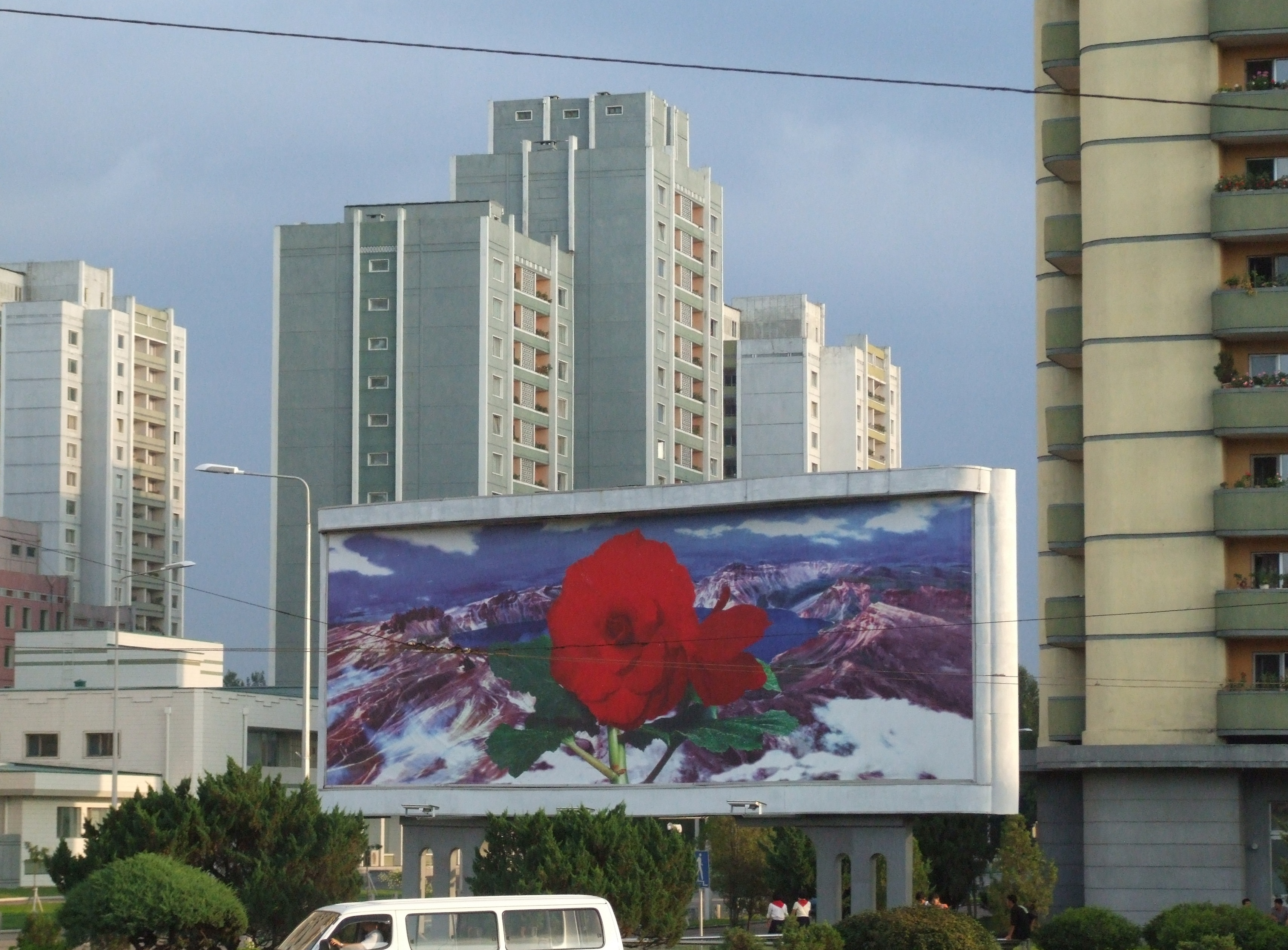 Die Nationalblume Kimjongilia auf einem Propaganda-Schild in Pjöngjang